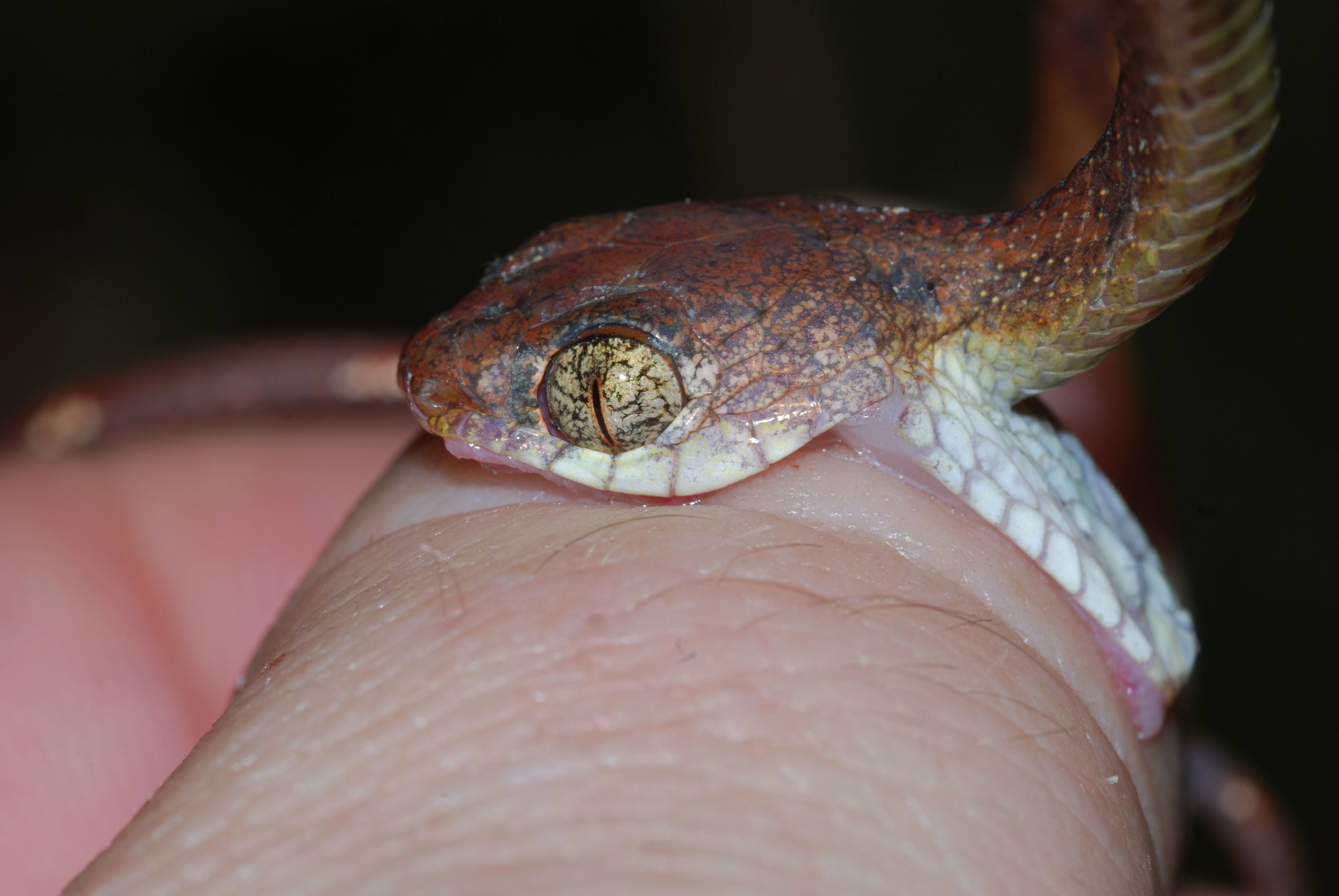 Tapah Hills, Perak, MALAYSIA